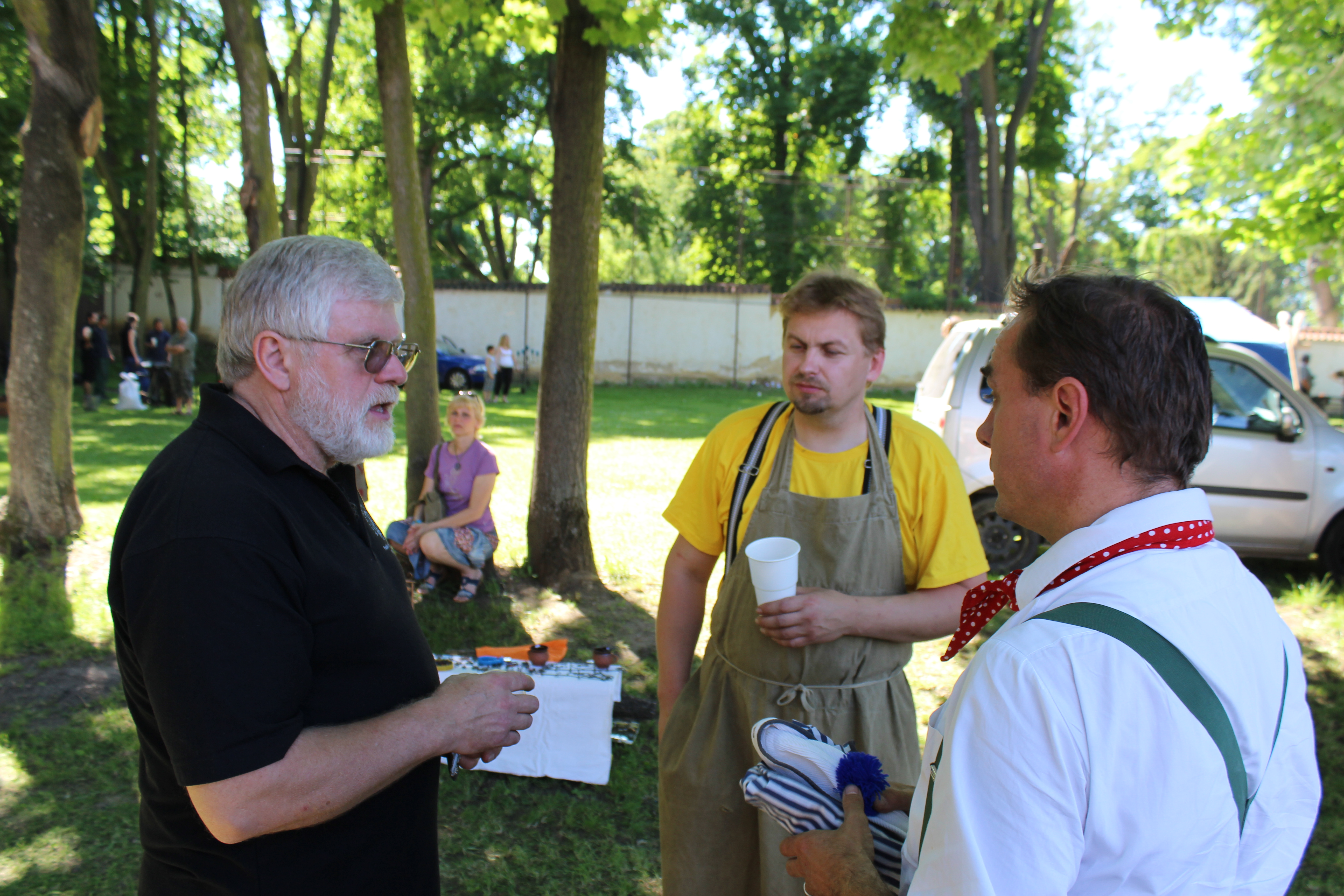 V Litni (okres Beroun) se o víkendu 7. a 8. 6. 2014 konalo 1. setkání kovářů, podkovářů, dráteníků, klempířů a všech, kteří pracují s kovem s názvem „Kováři v Litni“. Příští „Kováři v Litni“ se konají 6. – 7. 6. 2015 opět v Areálu Liteň a budou spojeni se setkáním absolventů škol, které zde působily: Středního odborného učiliště a Učňovské školy zemědělské, obor kovář – podkovář. Pořadateli jsou Atelier Svatopluk, o.p.s. Liteň a Kovárna pro radost v Kytíně.